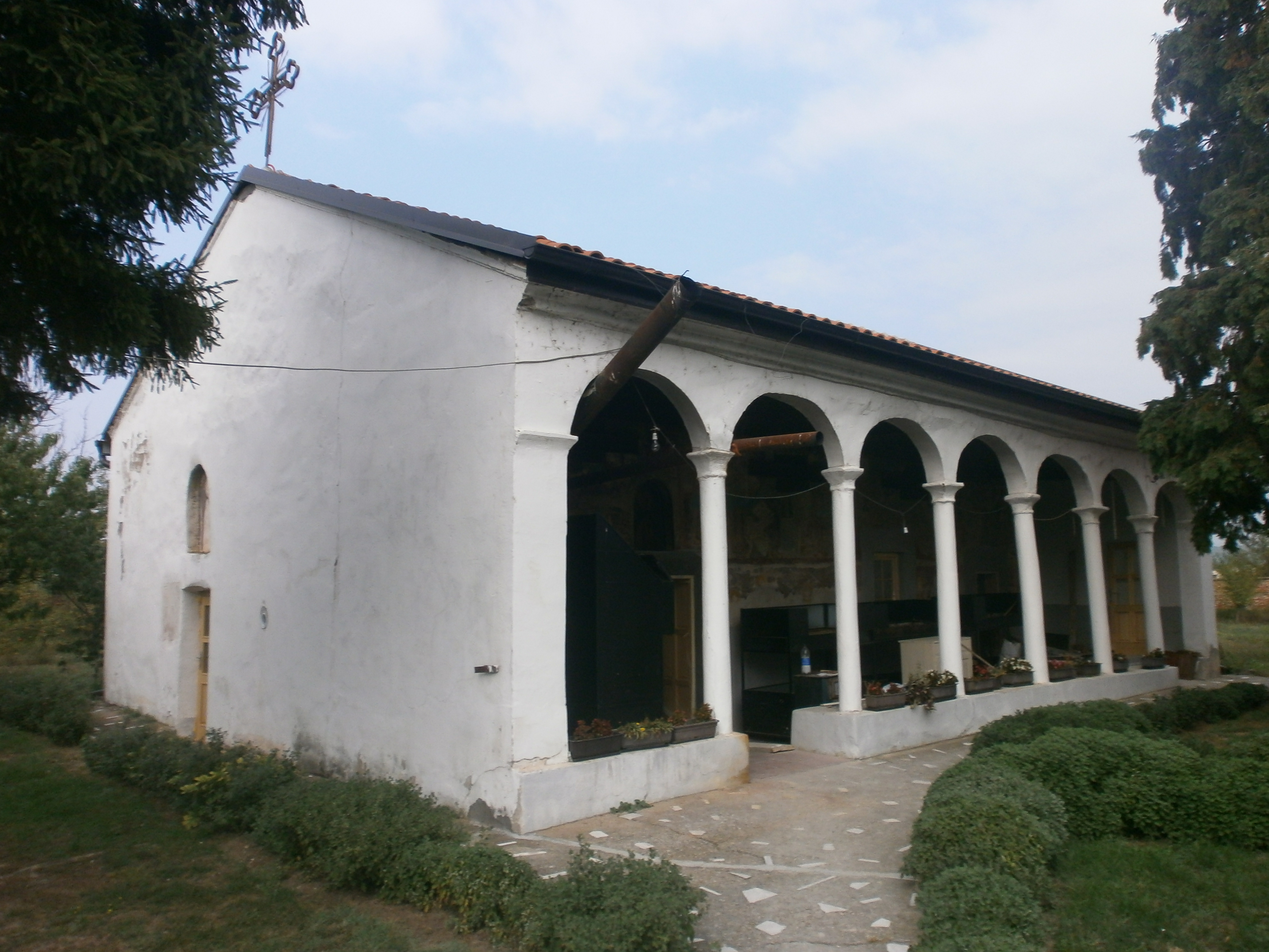 Srpski (latinica): Kumarevo, Leskovac